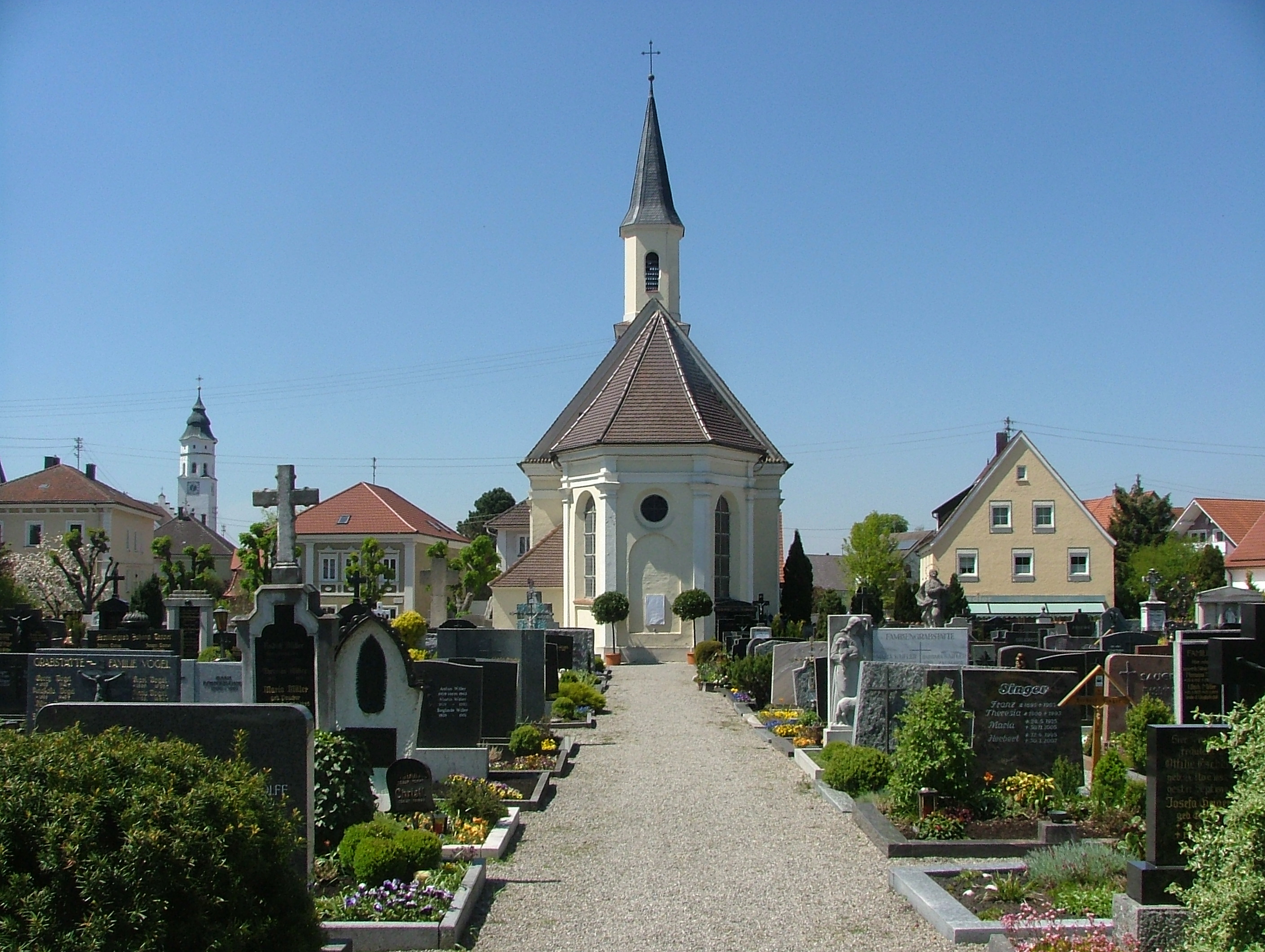 Totentanzkapelle Babenhausen